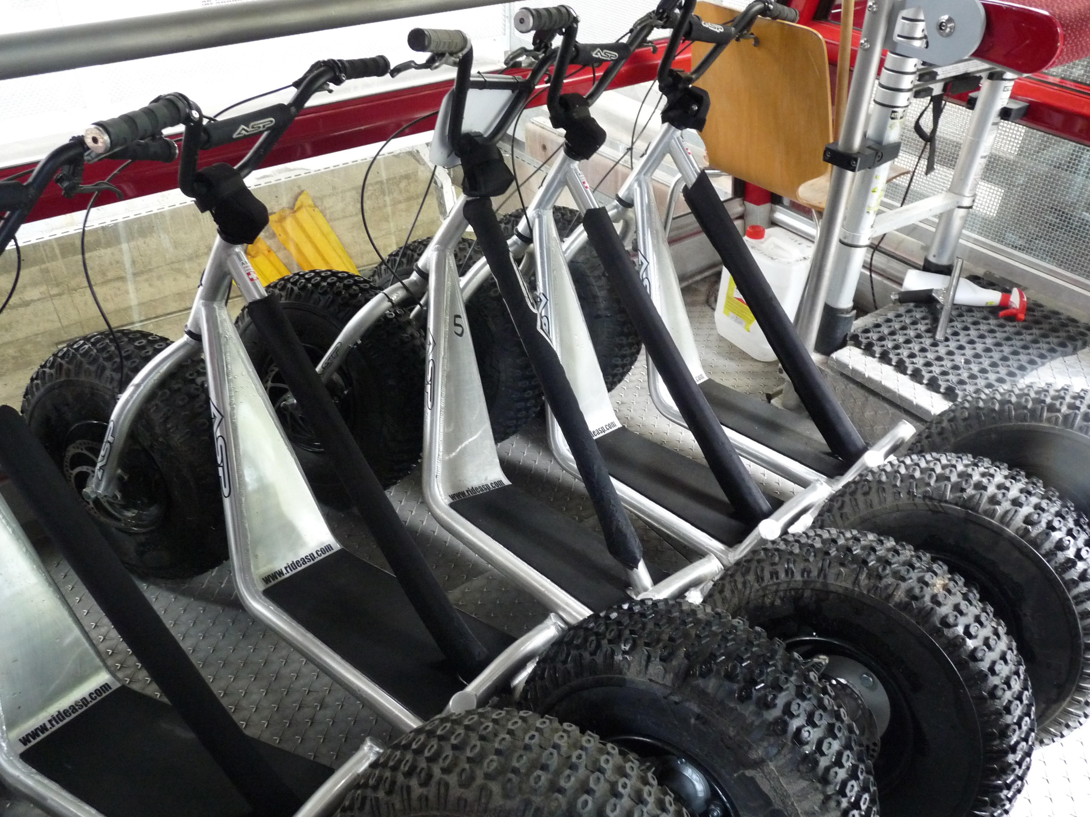 Trottinettes tout-terrain permettant de redescendre dans la vallée de Zinal (Valais, Suisse) depuis la station de téléphérique de Sorebois.